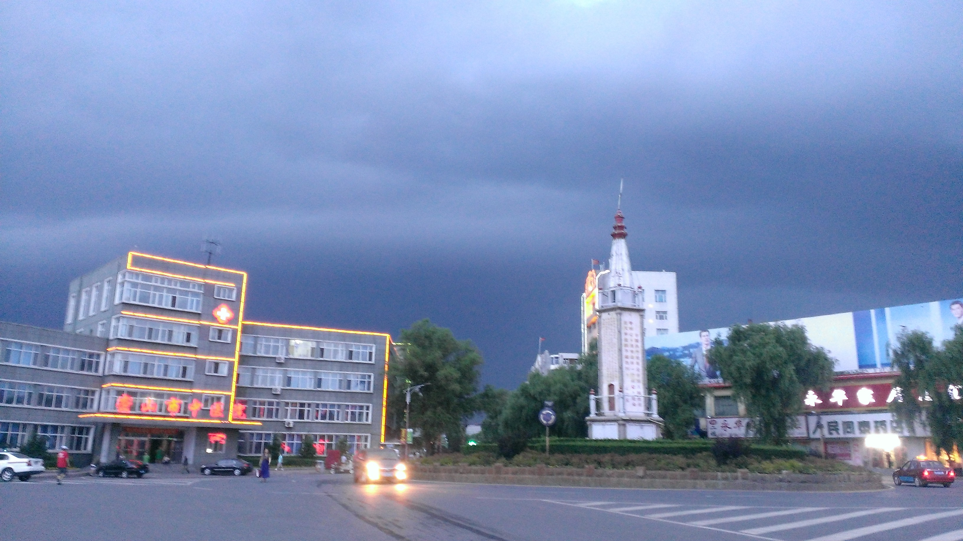 Mishan, Jixi, Heilongjiang, China